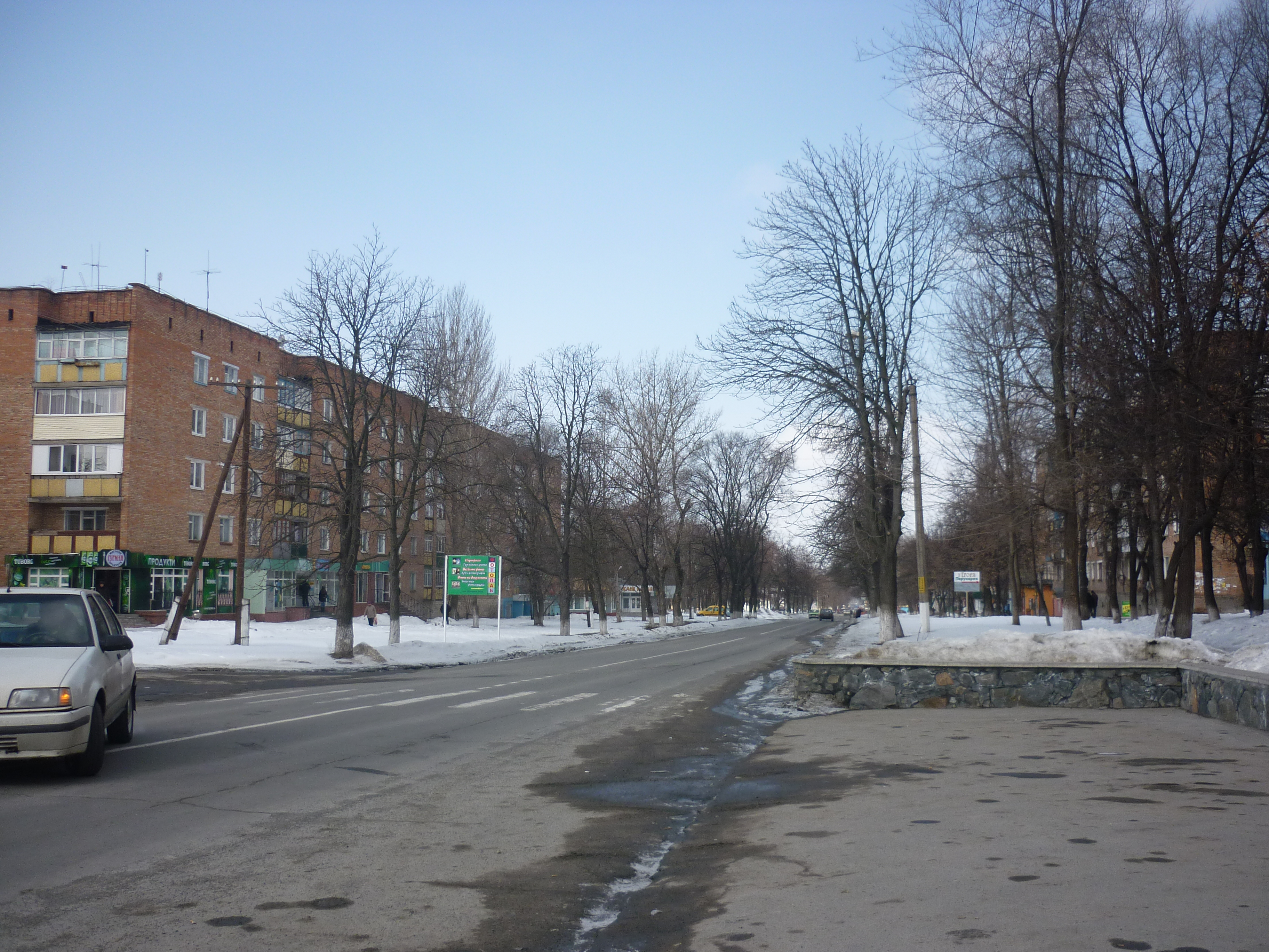 Вулиця Шевченка в місті Звенигородка Черкаської області